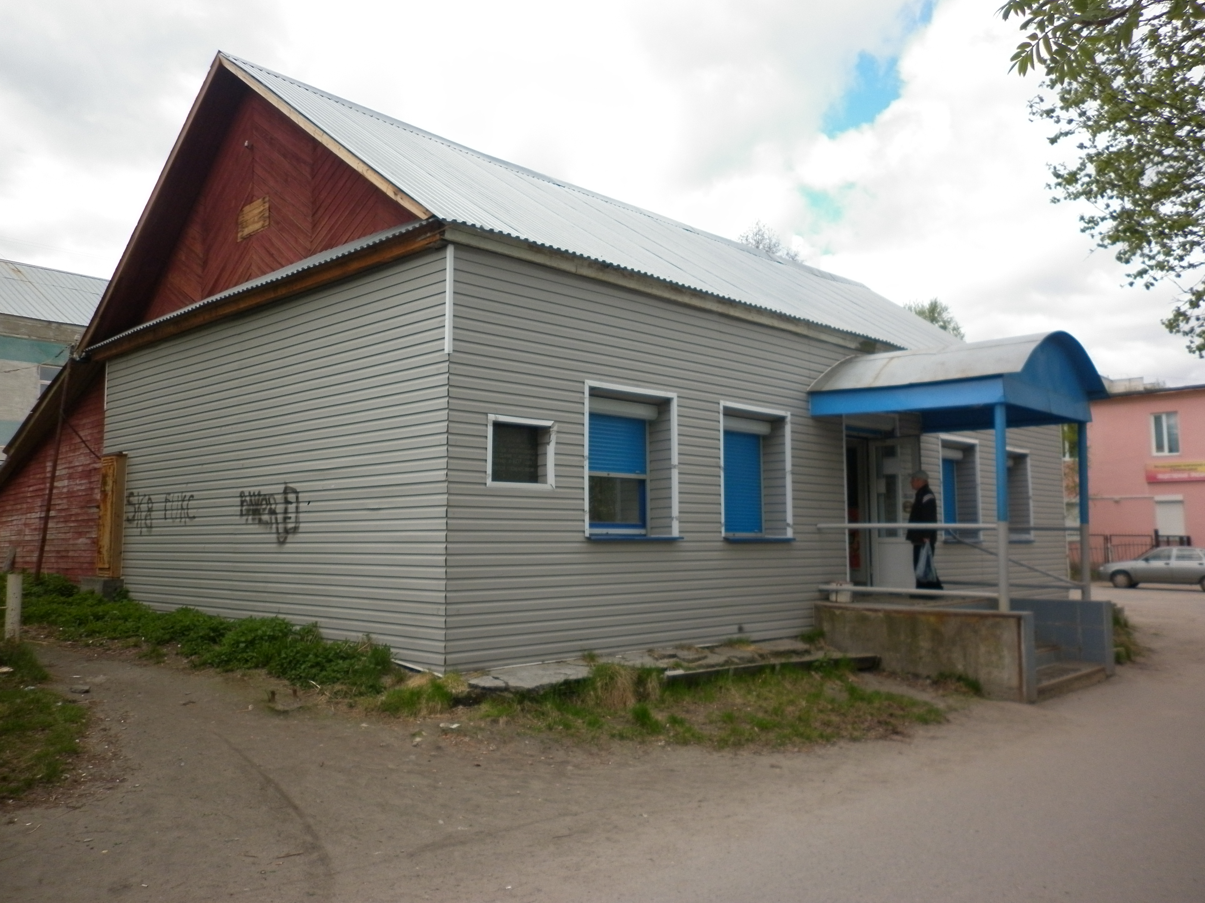 Здание уездного казначейства постройки 1807 года в городе Коле.